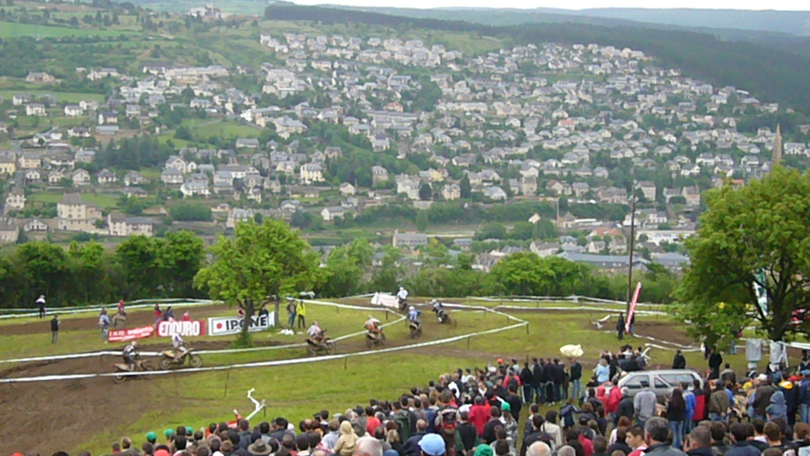 Trophée Castan, finale du Trèfle lozérien 2008